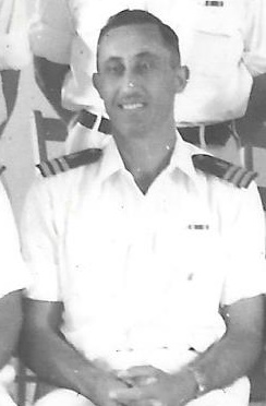 סא"ל אלכס שור 1954